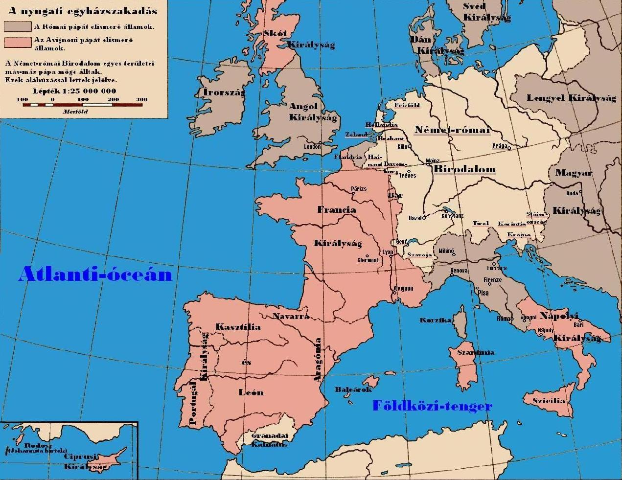 Nyugati skizma